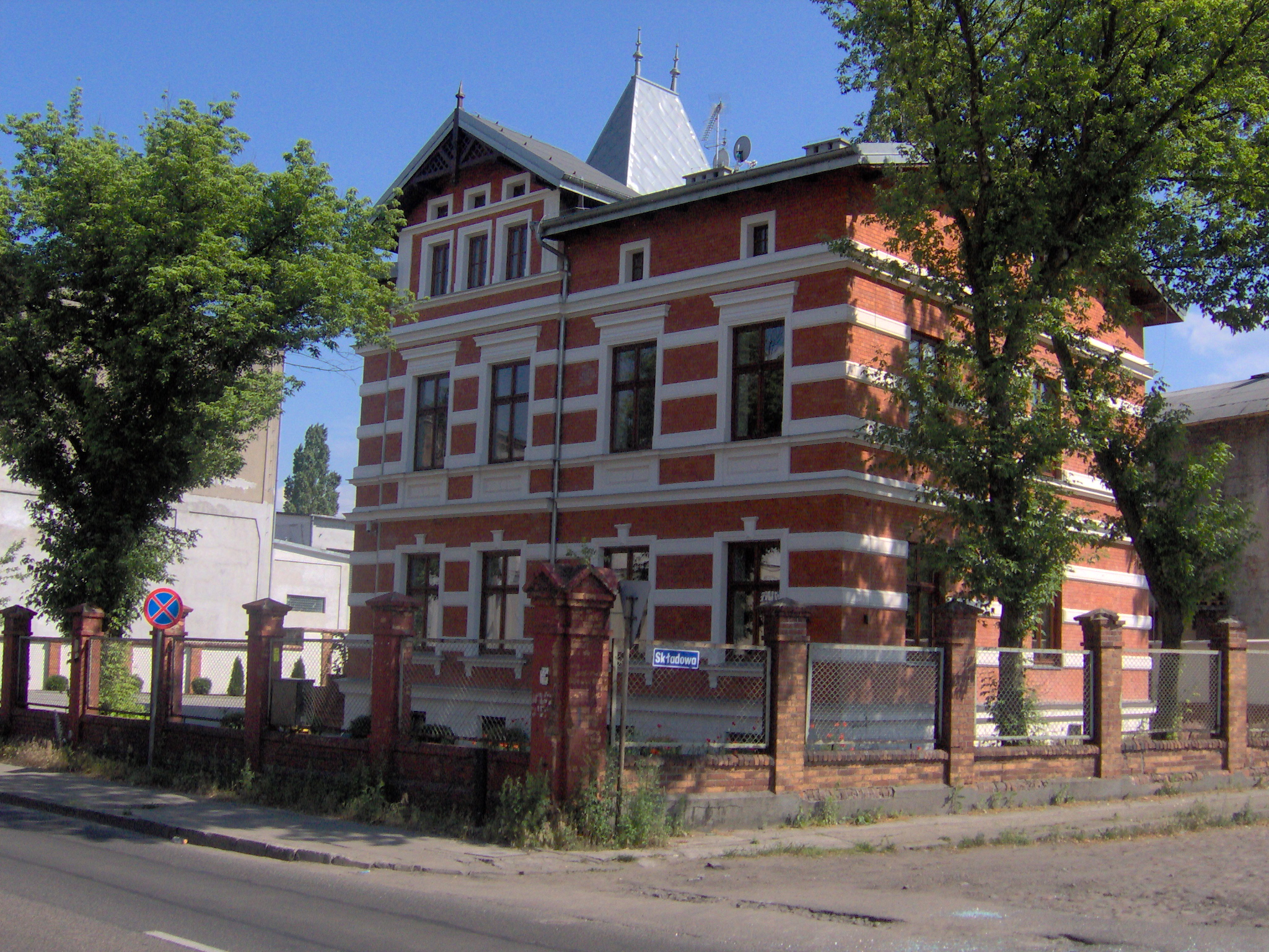 Pozostałości po celulozie (2007 r.)